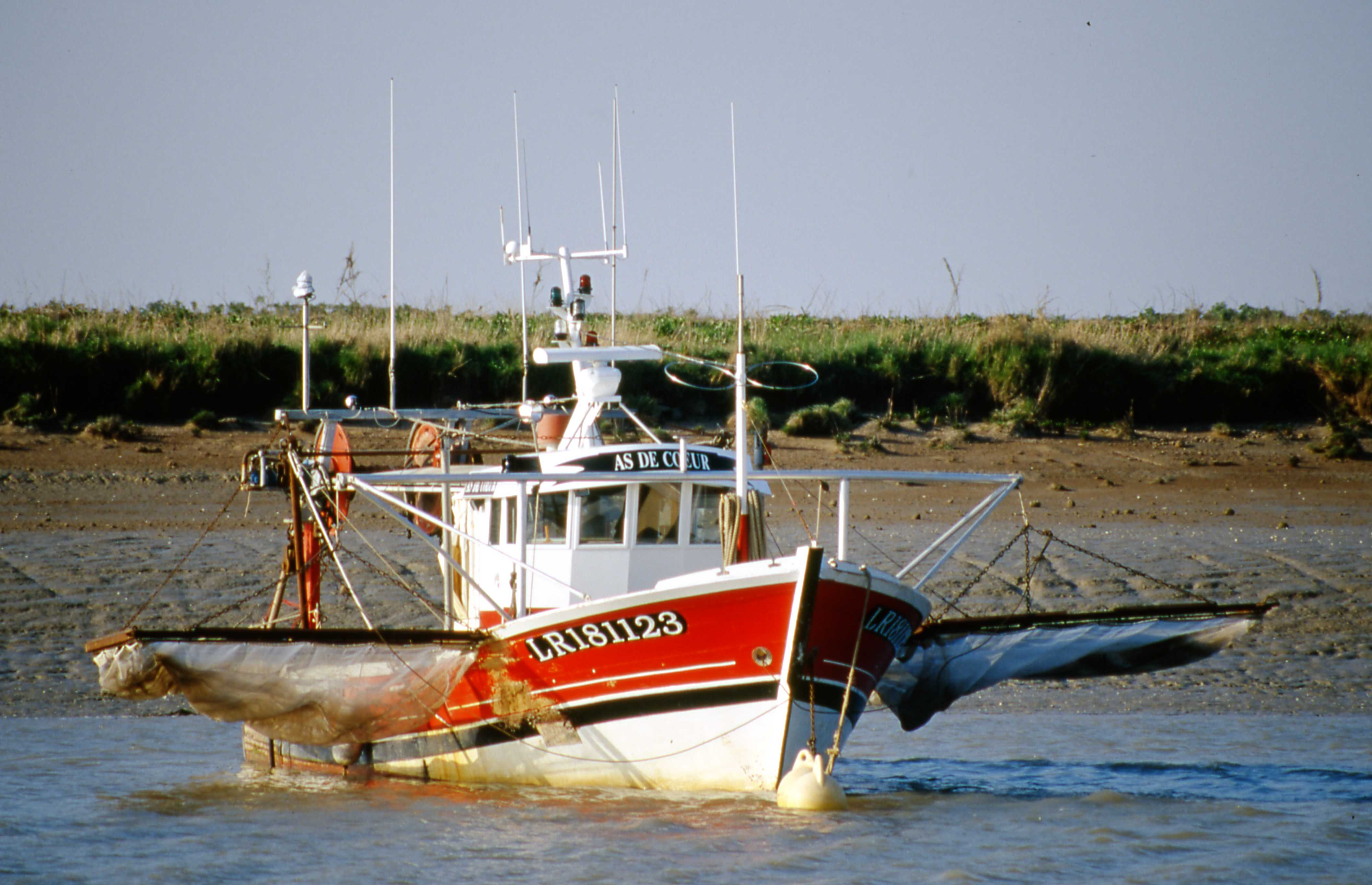 Chalutier équipé de filets à mailles très fines (pibalous) pour la pêche à la civelle (pêche à la pibale). Port du Corps de Garde sur la Sèvre Niortaise, Bourg-Chapon (près de Charron, Anse de l'Aiguillon), Charente Maritime, France. Mars 2000.